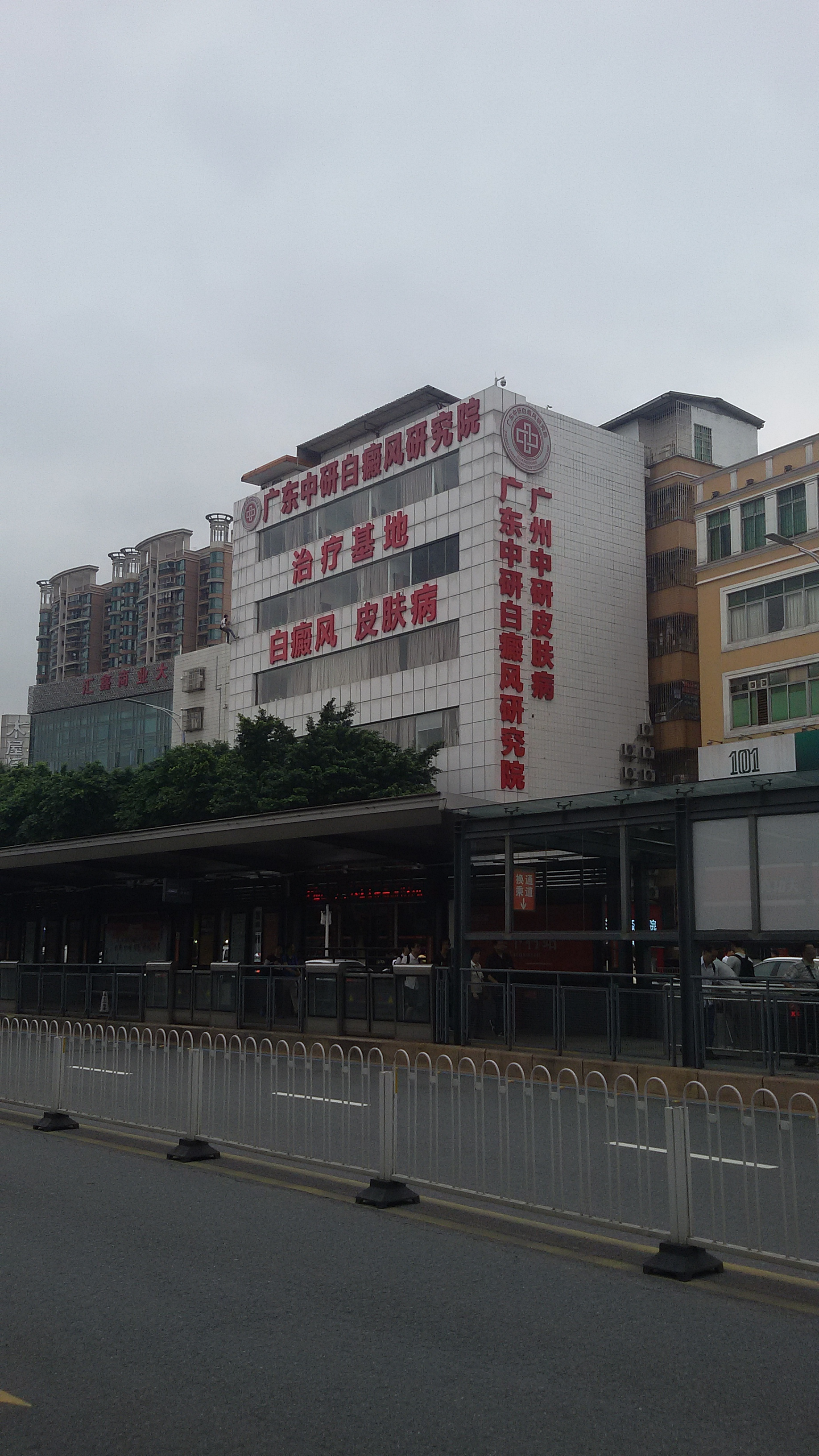 粵語: 廣東省中研白癜風醫學研究院